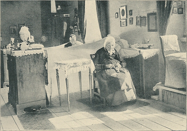 Interiør fra Vartov i København omkring år 1900